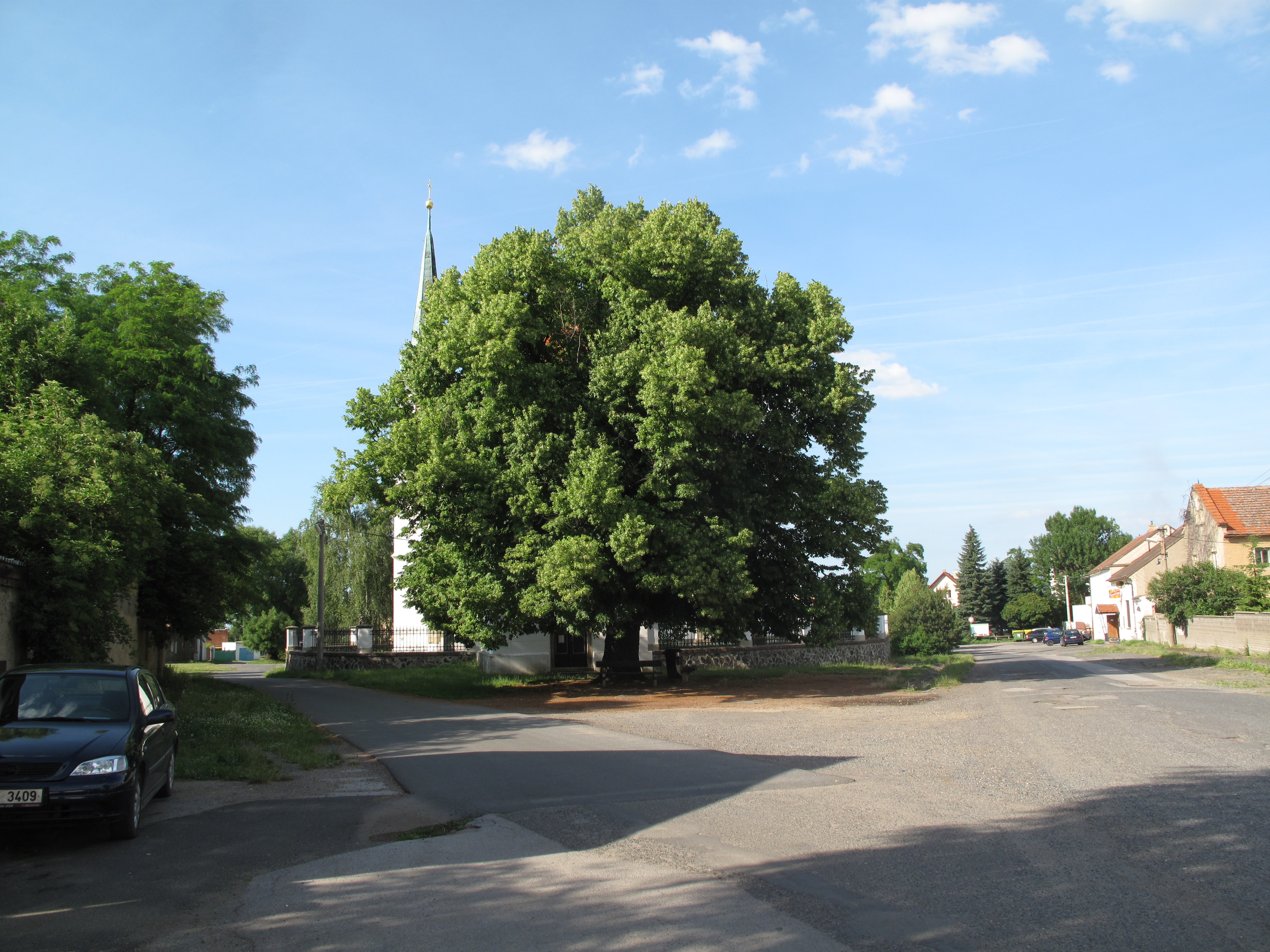 Veliká Ves